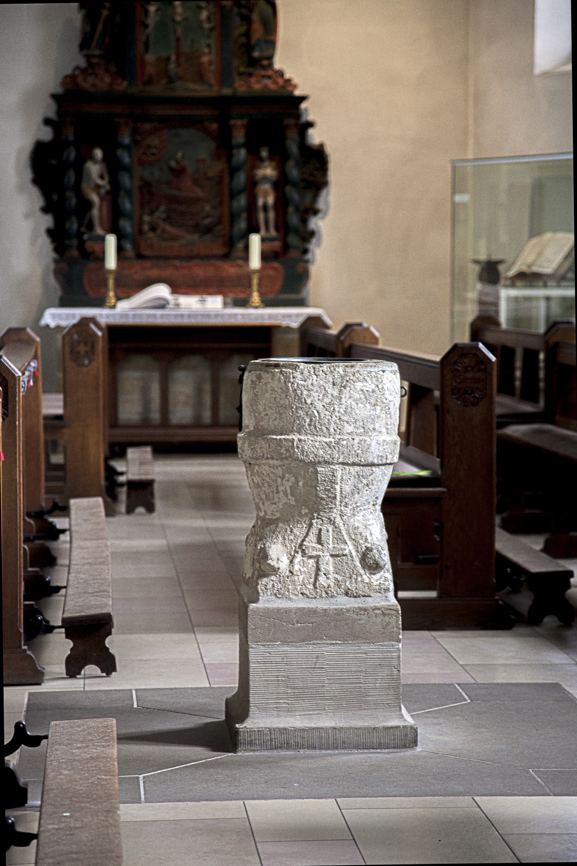 Elte, St. Ludgerus, Taufstein